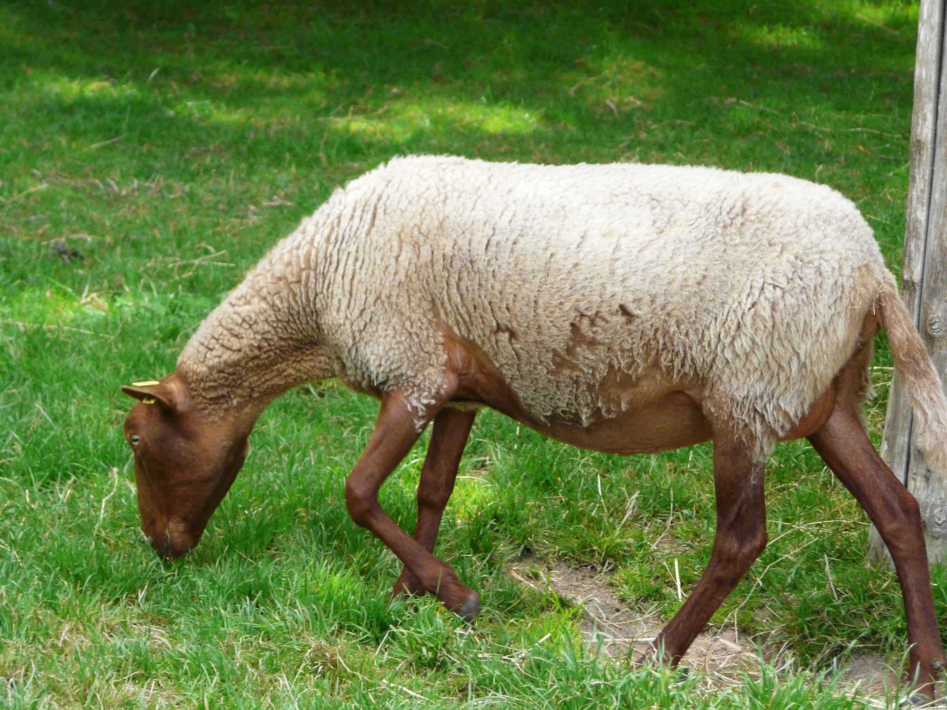 Mouton solognot, Grand parc du Puy du Fou, Vendée, France